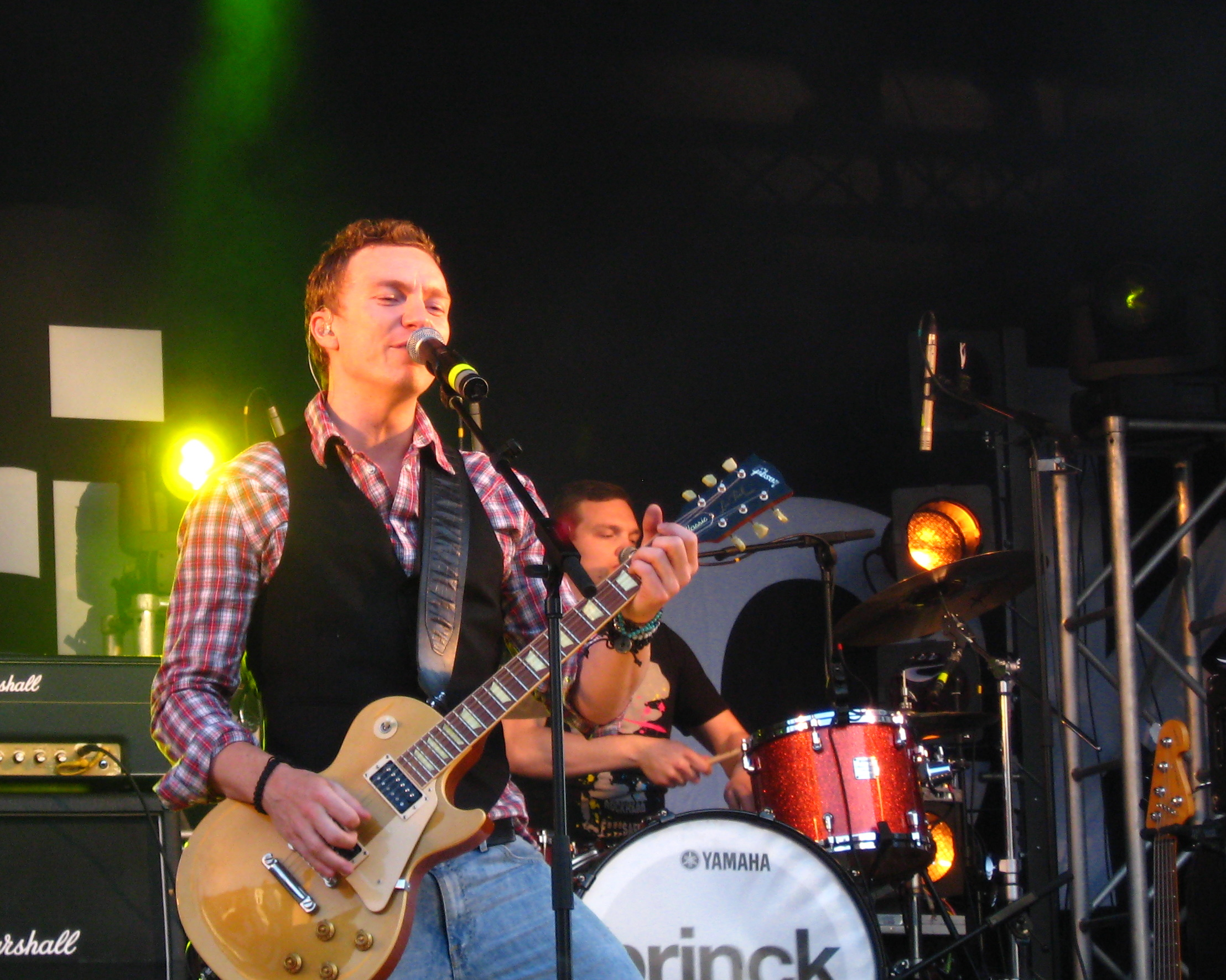 Brinck i Hjørring, juni 2009